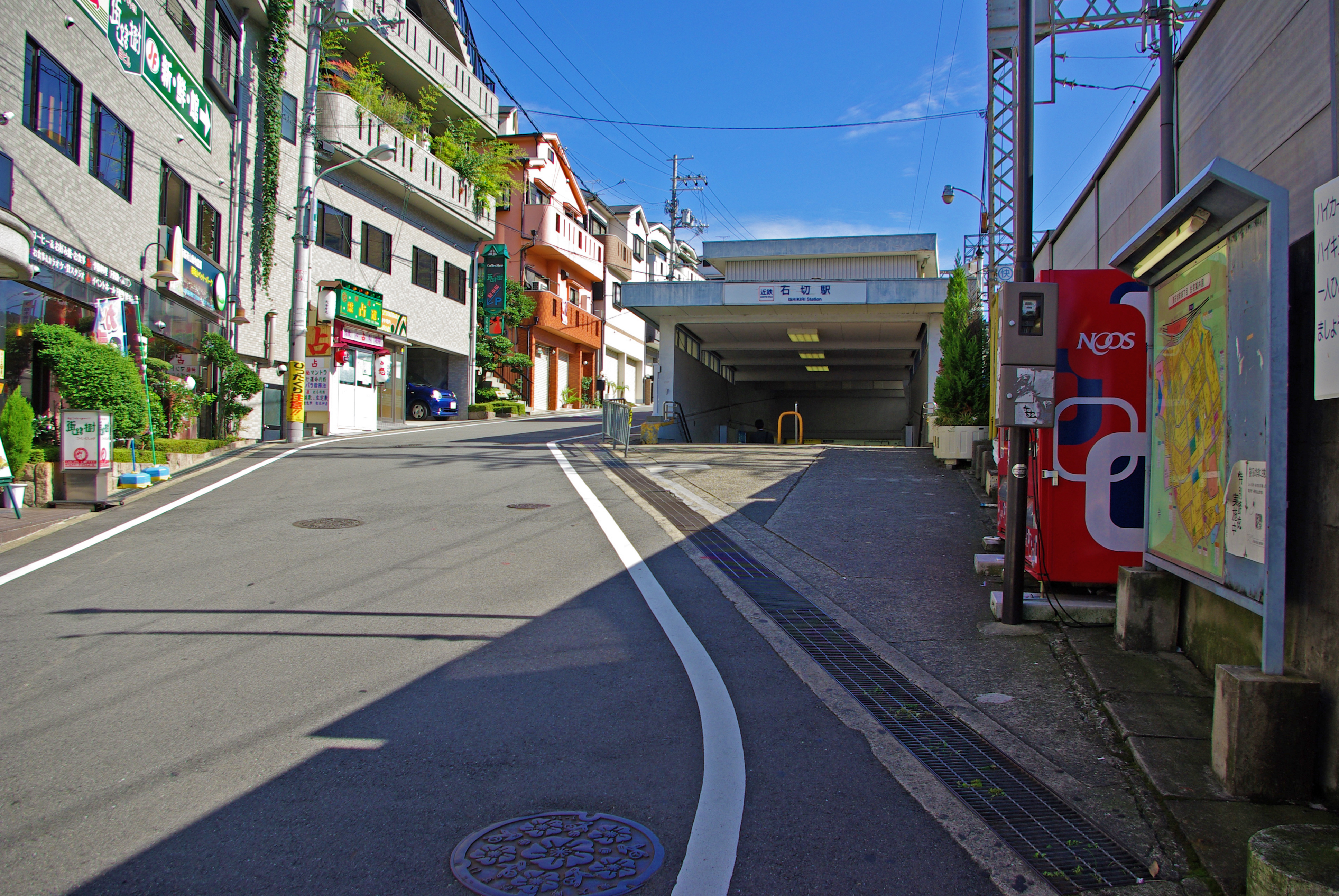 近畿日本鉄道奈良線石切駅